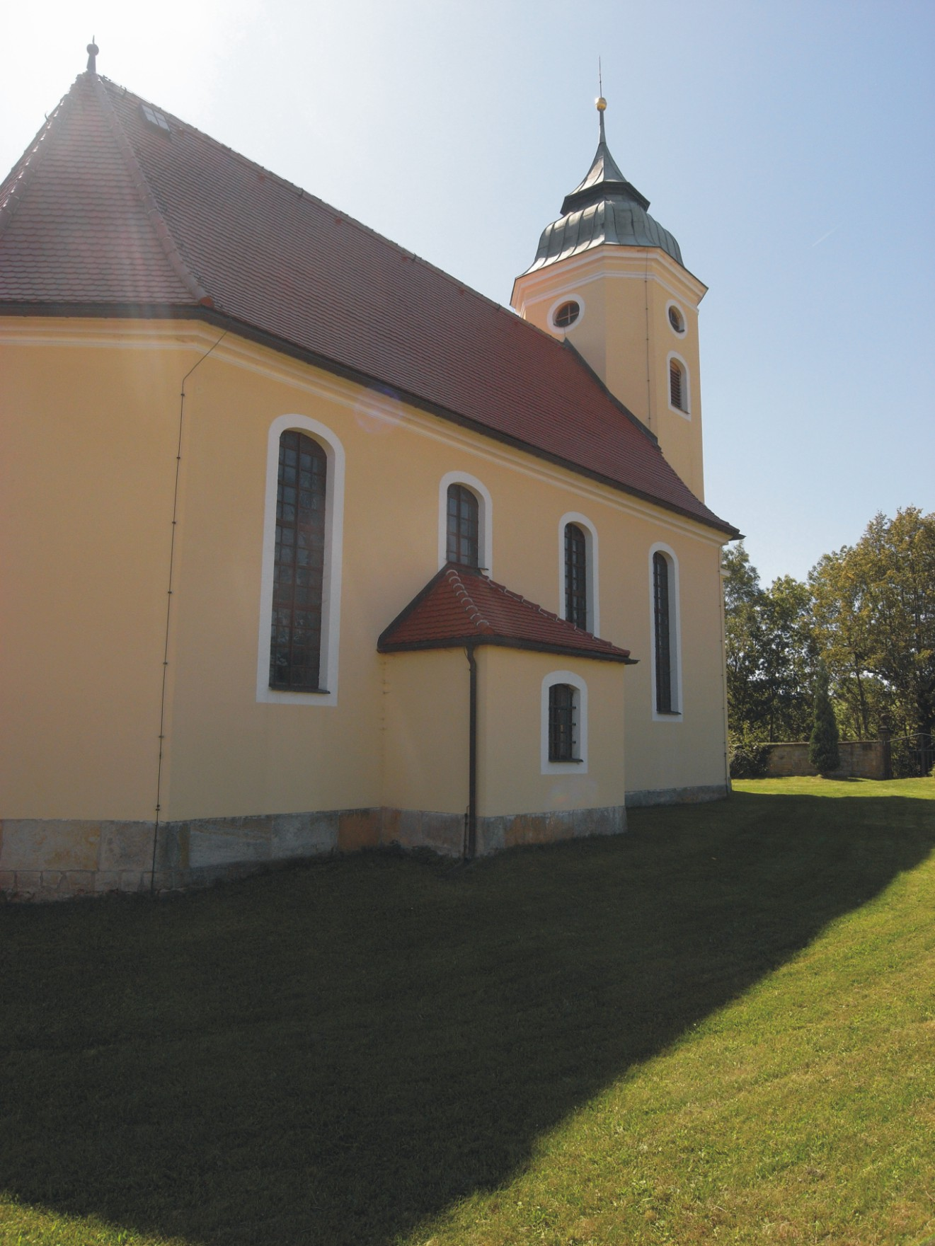 Bahretal, Ortsteil Borna, Evangelische Pfarrkirche (1753) (Deutschland, Sachsen)